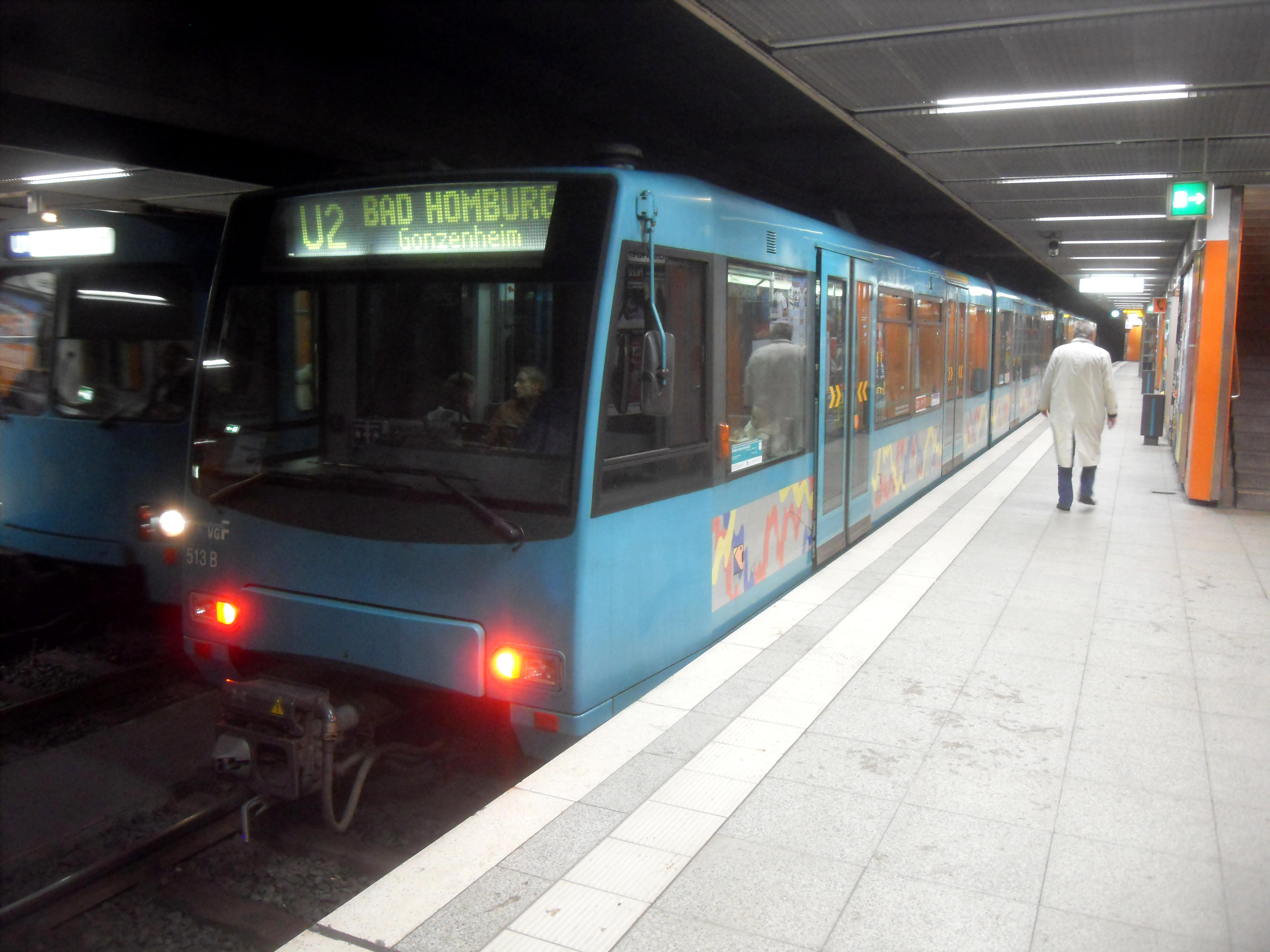 U 4-Triebwagen der U-Bahn Frankfurt im U-Bahnhof Holzhausenstraße auf der Linie U 2 auf dem Weg nach Bad Homburg-Gonzenheim in Hessen (Deutschland)